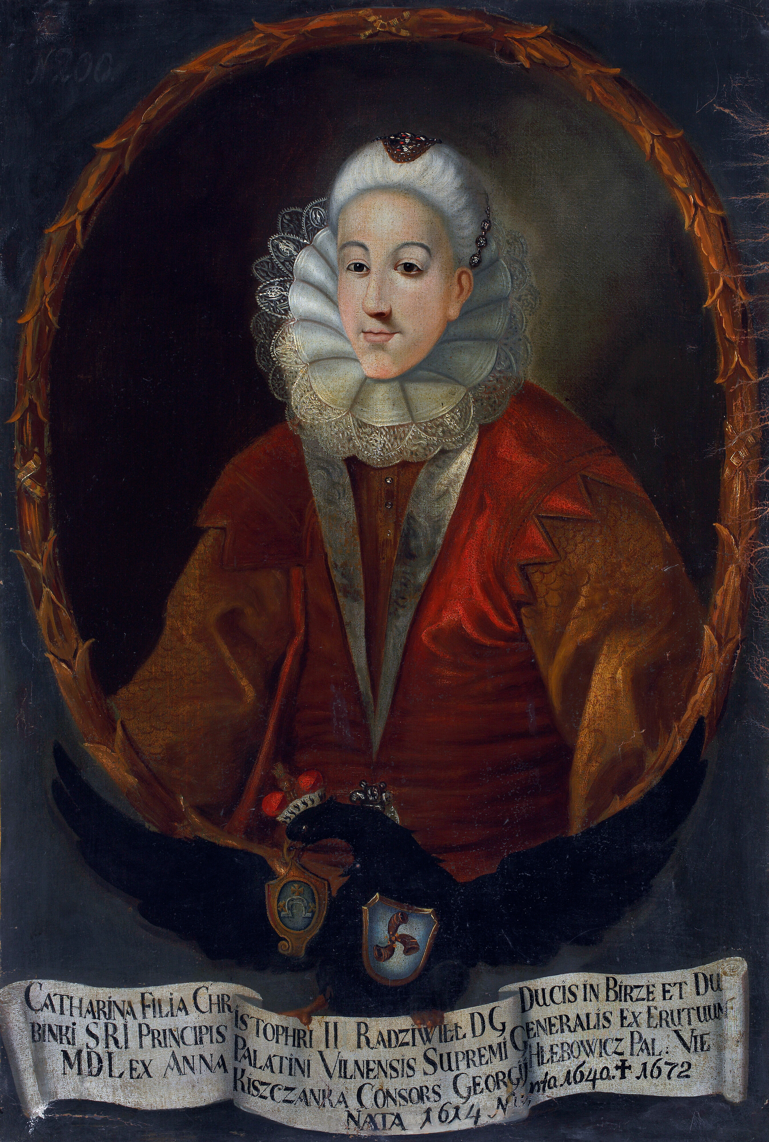 Беларуская (тарашкевіца): Партрэт Кацярыны Глябовіч (Kaciaryna Hlabovič) з князёў Радзівілаў (Radzivił)